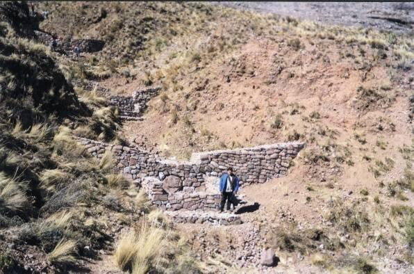 Control de la erosión en causes temporales, mediante diques filtrantes.